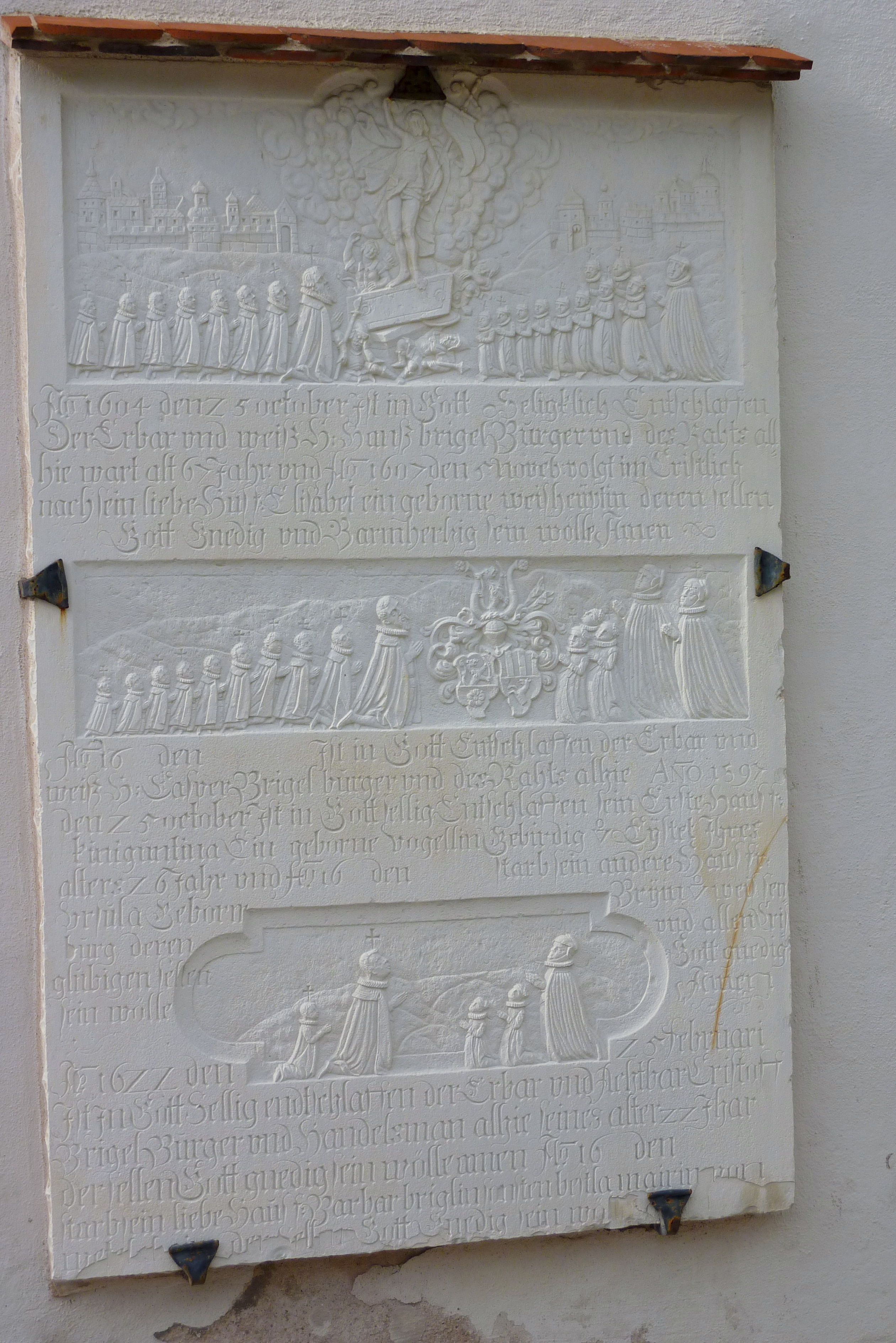 Galluskirche, ehemalige Pfarrkirche, heute Friedhofskirche in Pappenheim im Landkreis Weißenburg-Gunzenhausen (Bayern), aus dem 9. Jahrhundert; Grabplatte am Eingang der Kirche